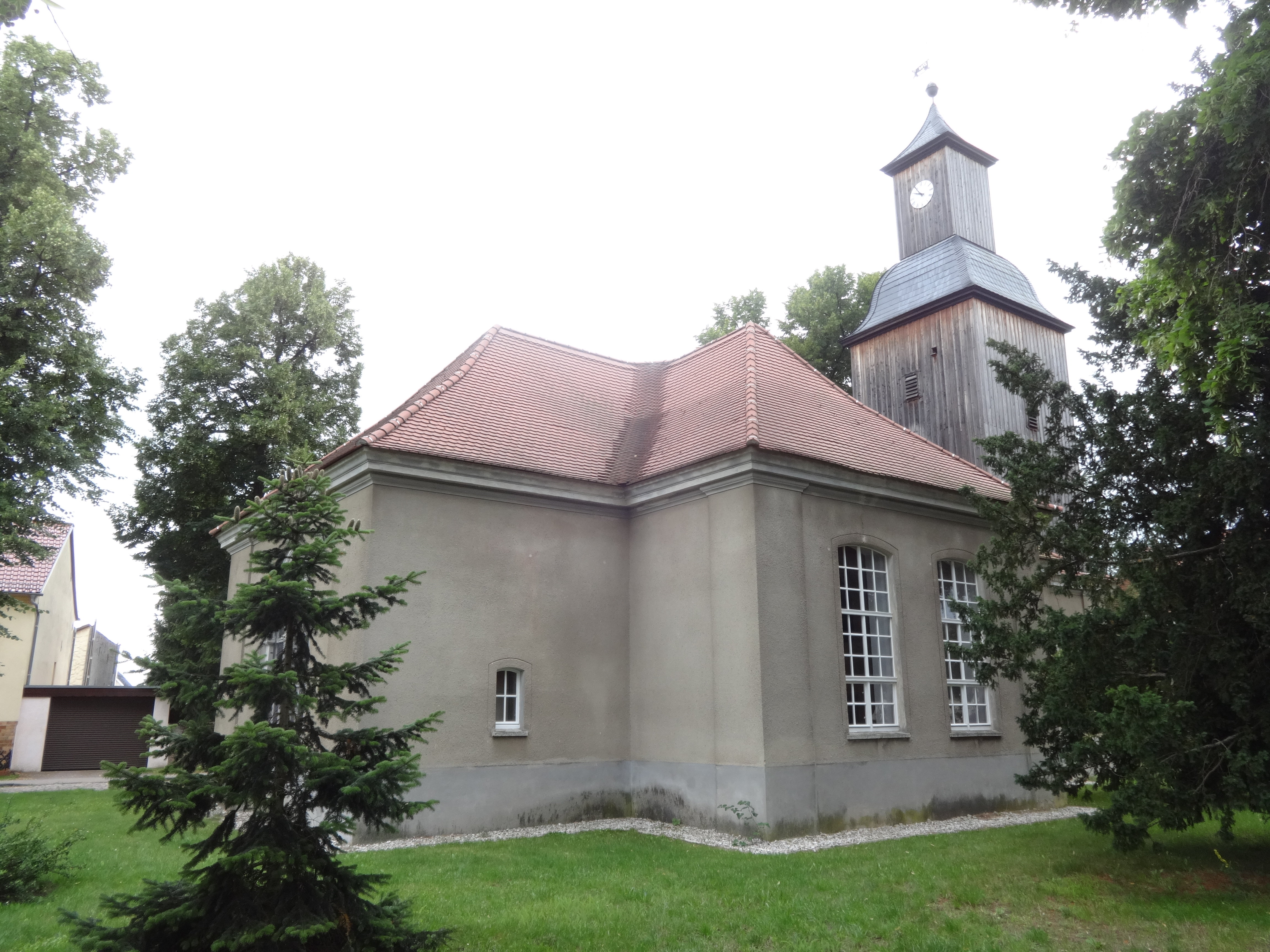 Die Dorfkirche in Groß Schulzendorf ist eine barocke Saalkirche, die vermutlich im Jahr 1744 errichtet wurde. 1896 erweiterte die Kirchengemeinde das Bauwerk um ein Querhaus und ein Chorquadrat. Die Kirchenausstattung ist modern. Das Bauwerk steht in der Stadt Ludwigsfelde im Landkreis Teltow-Fläming in Brandenburg.